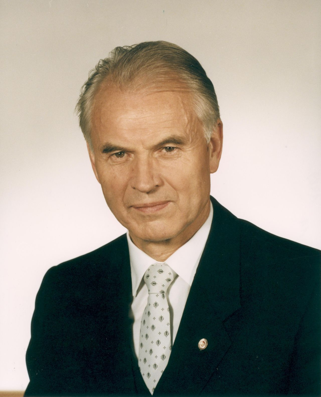 ADN-ZB/Schöps/17.11.89 Berlin: Dr. Hans Modrow (SED), Ministerpräsident der DDR (bis 11.4.1990)